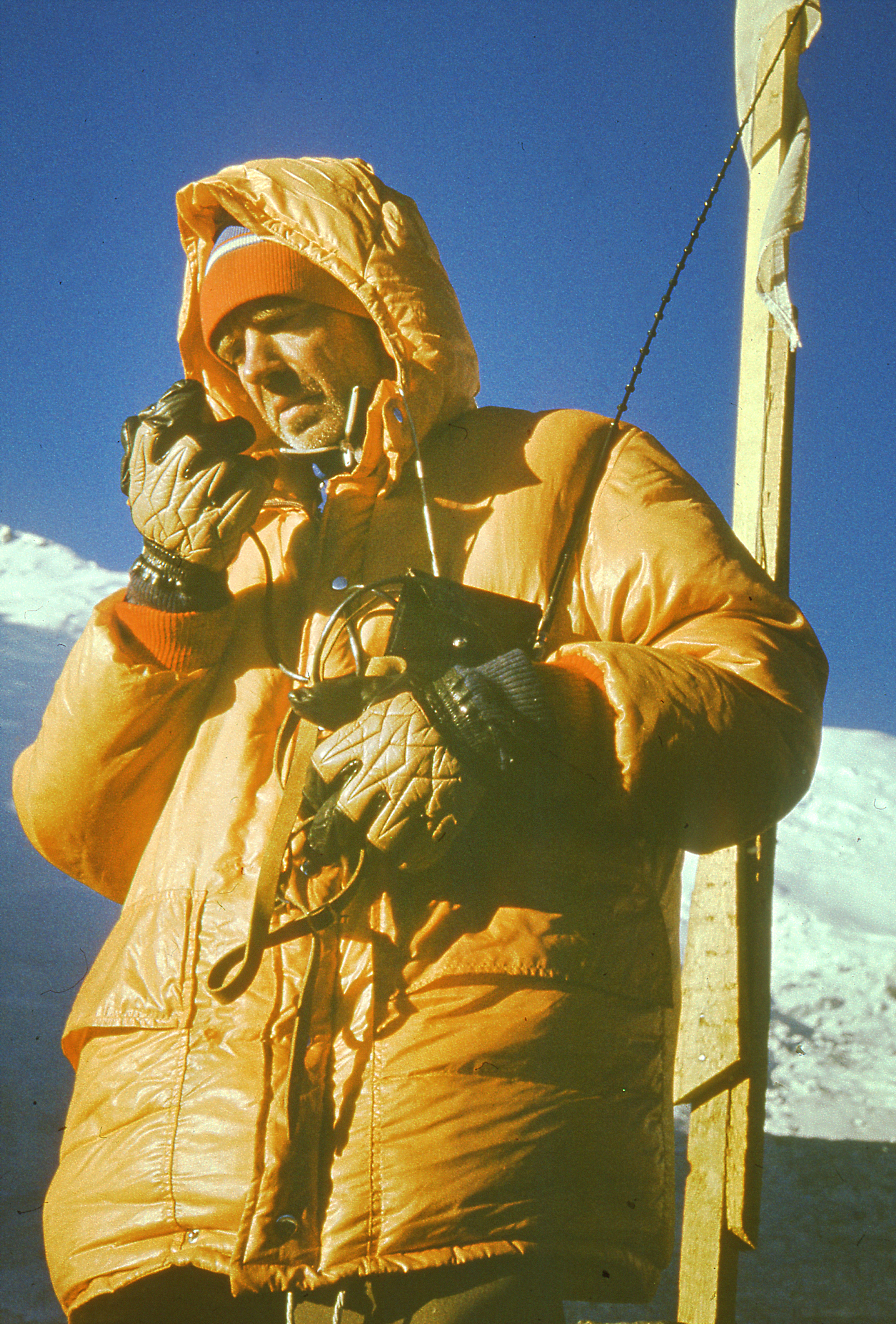 Ilmar Priimets